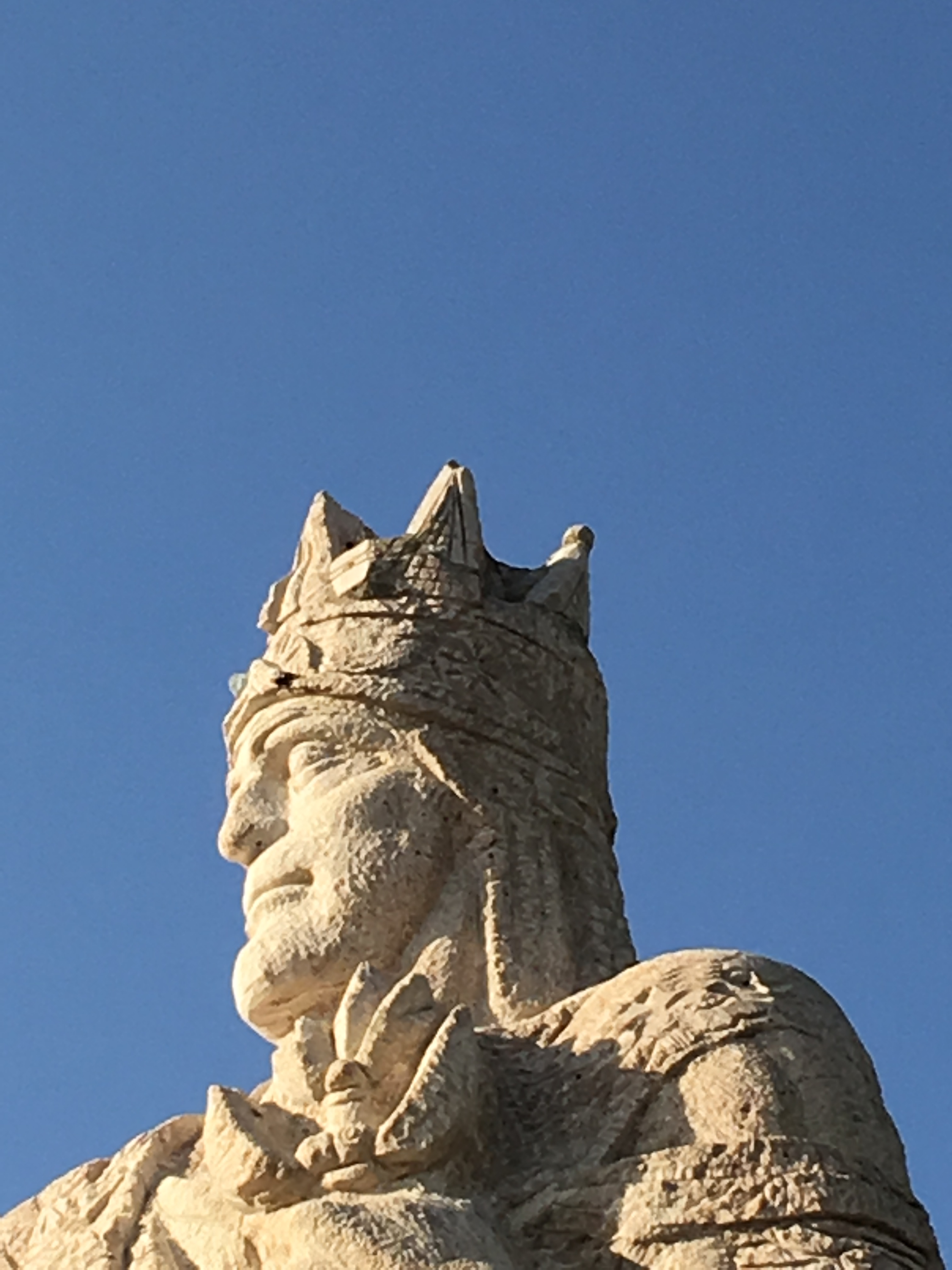 Տիգրան Բ Մեծի հուշարձանը, Նոր Նորք, Երևան, Հայաստան